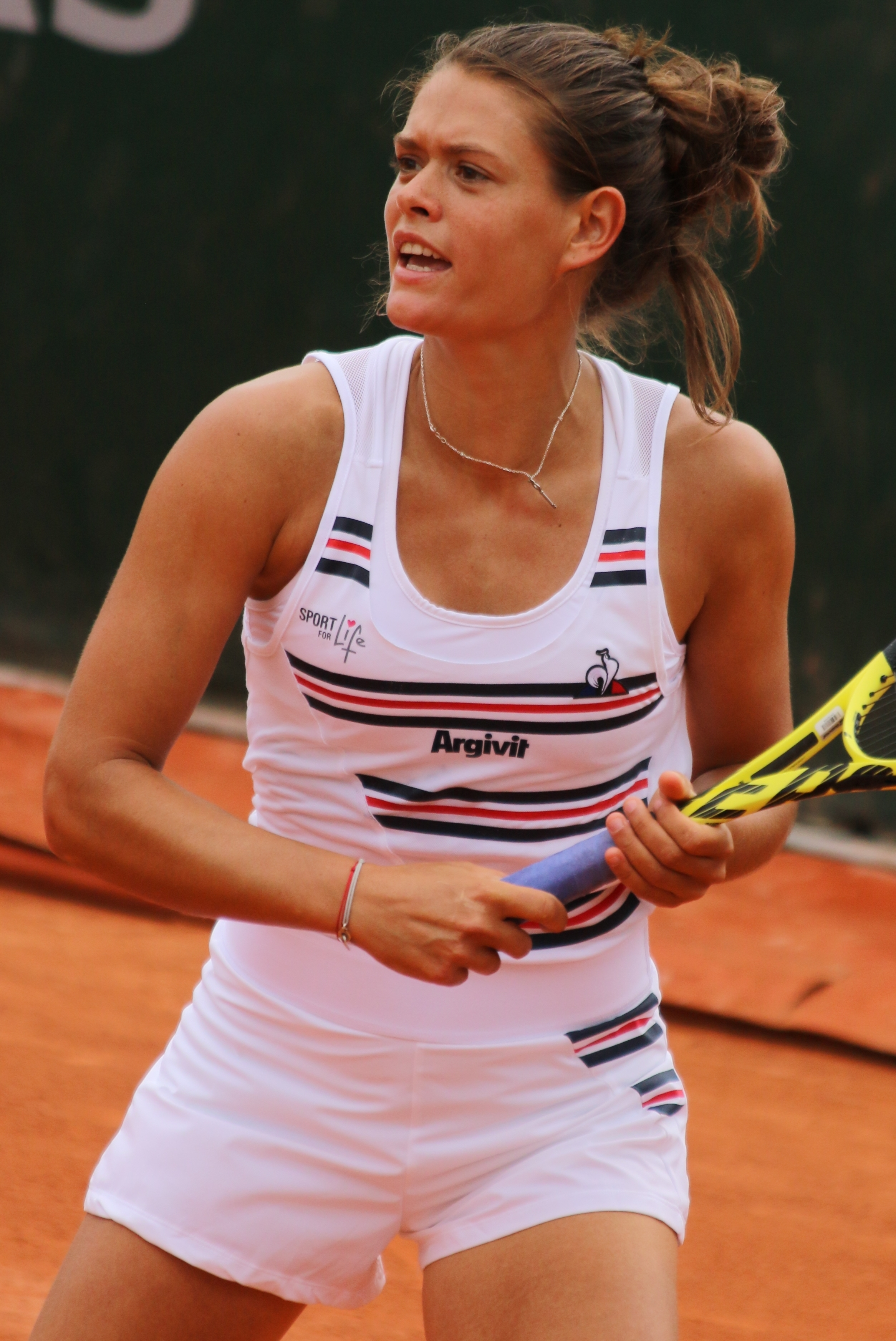 Paquet RG19 (14)